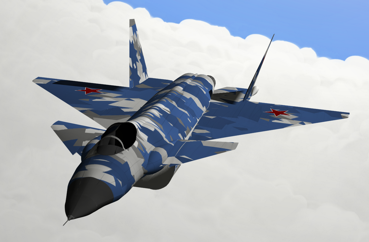 Mikoyan Project 1.44